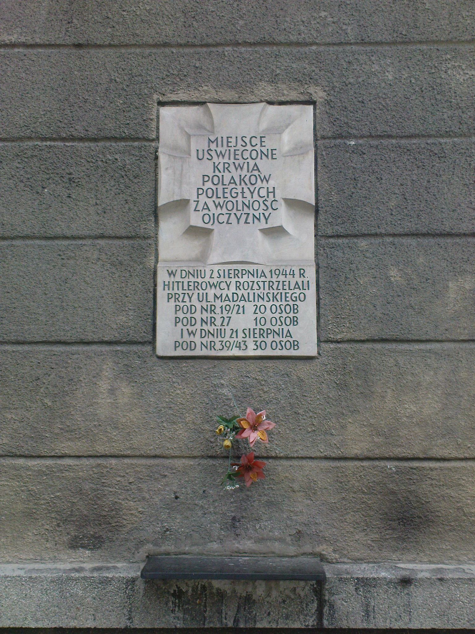 Tablica upamiętnia rozstrzelanie przez hitlerowców na ulicy Madalińskiego 60 osób: 2 sierpnia 1944 r: pod numerem 19/10 - 20 osób pod numerem 27 - 10 osób oraz 1 sierpnia pod numerem 39/43 - 30 osób